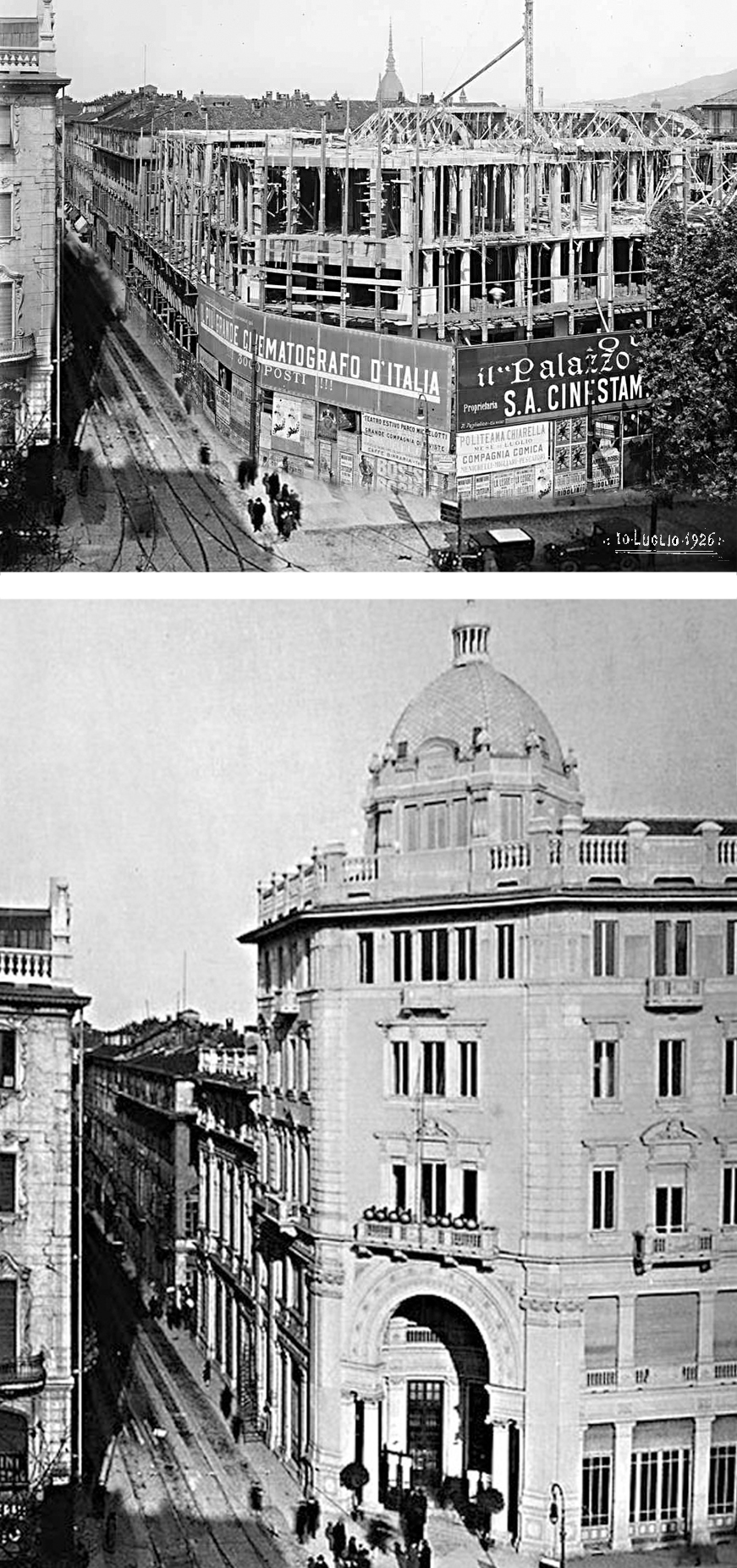 Immagine dell'edificio che ospitò il Cinema Corso a Torino nel 1926 (in costruzione e completato)